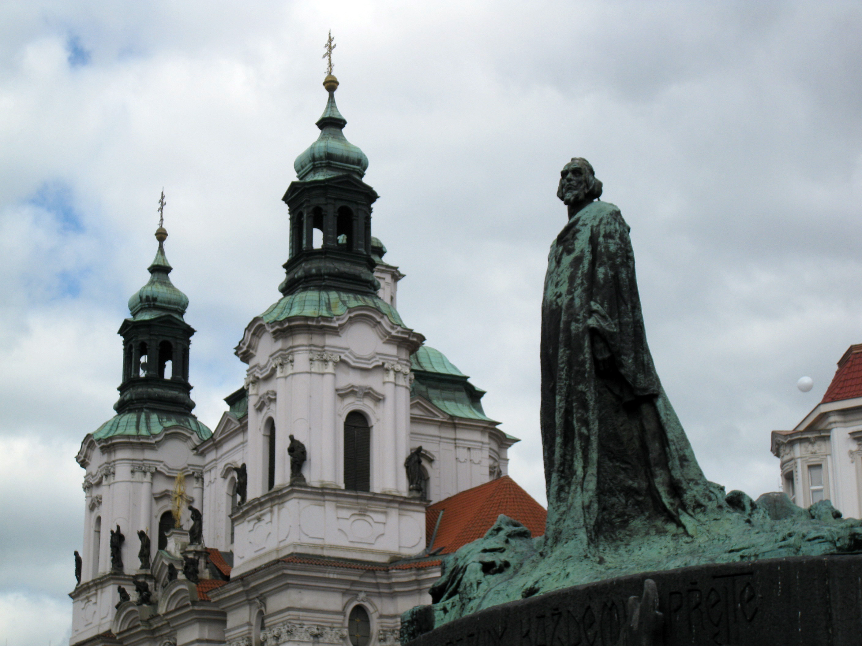 Pomník Mistra Jana Husa, Praha 1, Staroměstské nám., Staré Město